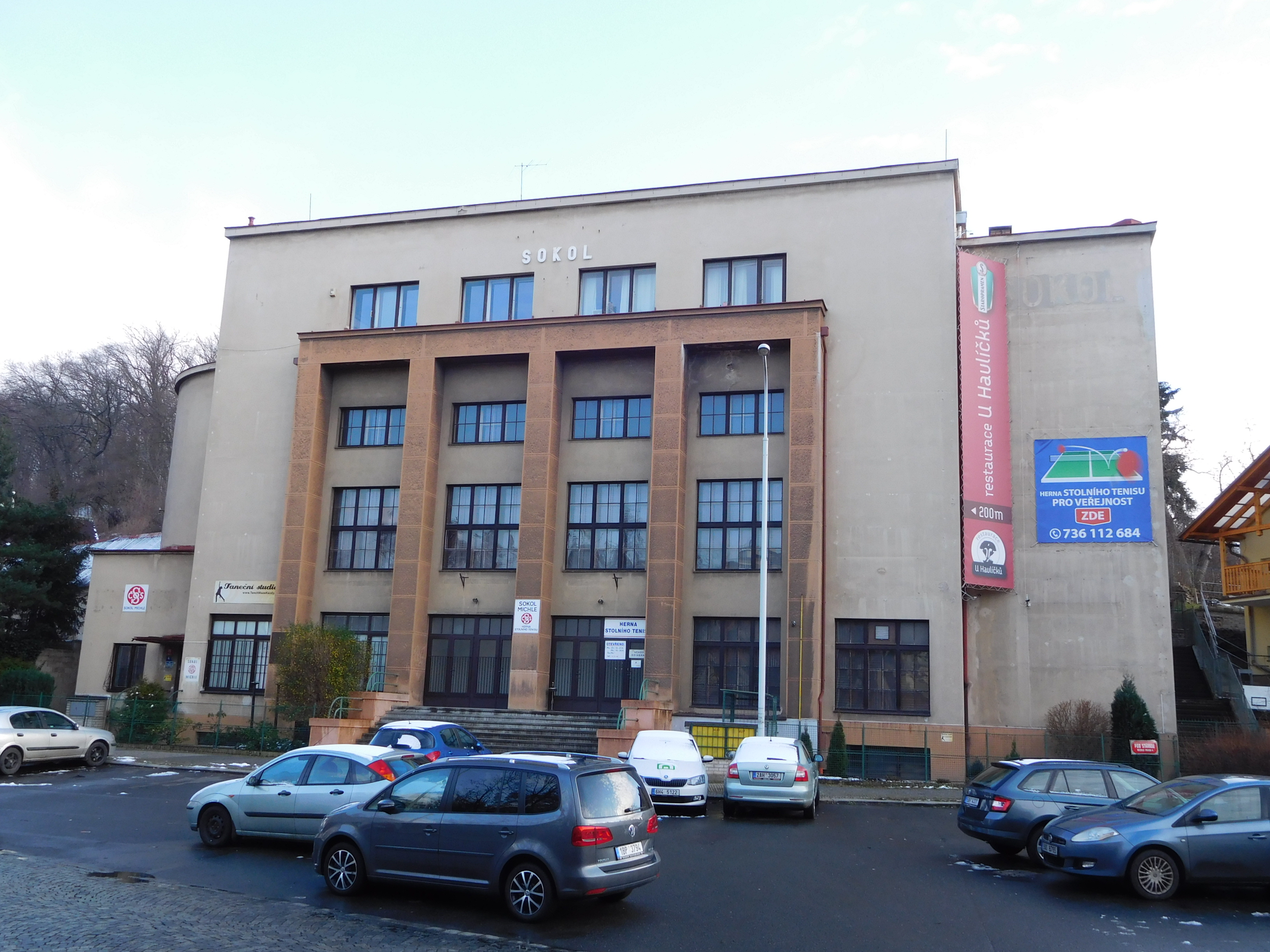 Praha - Michle - Pod Stárkou 4, sokolovna (arch. Josef Kučera, 1937–1938)